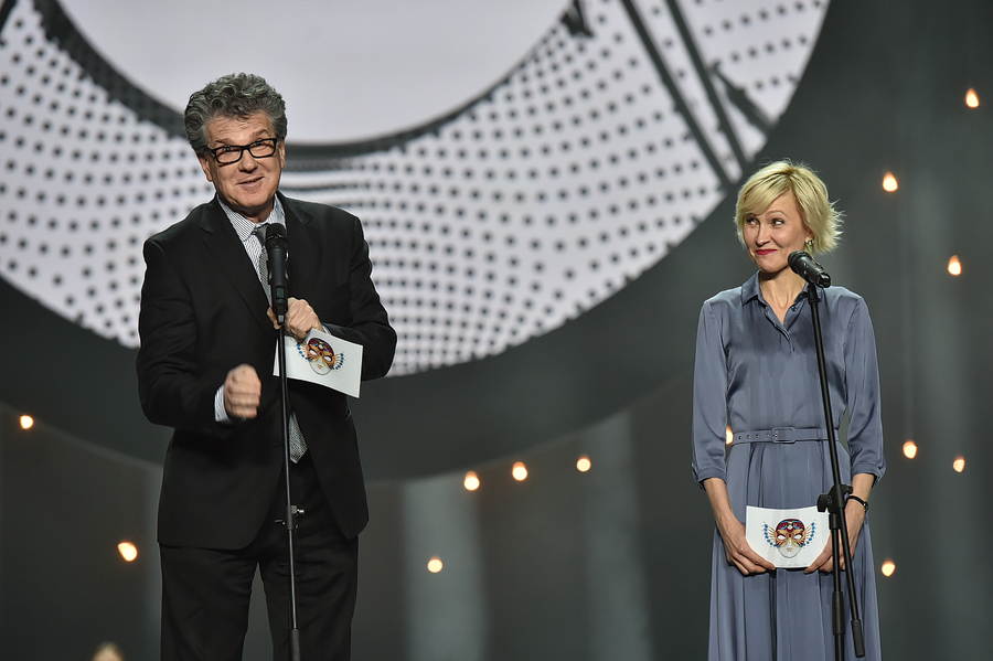 Премия Золотая маска - 2017 года